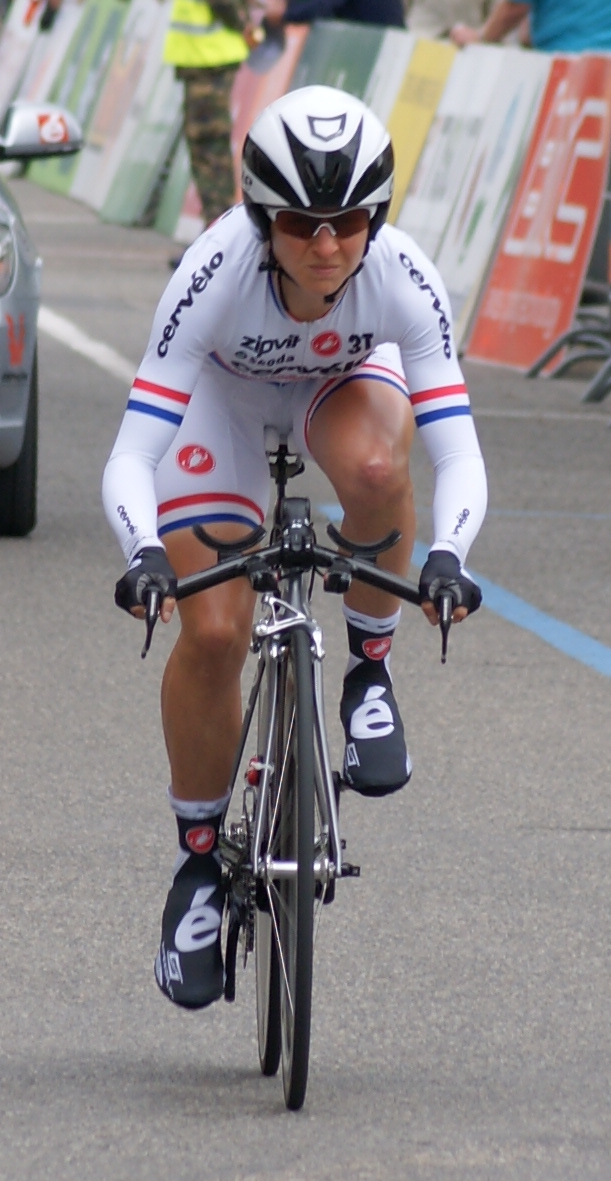 Emma Pooley au départ du grand prix suisse féminin 2010